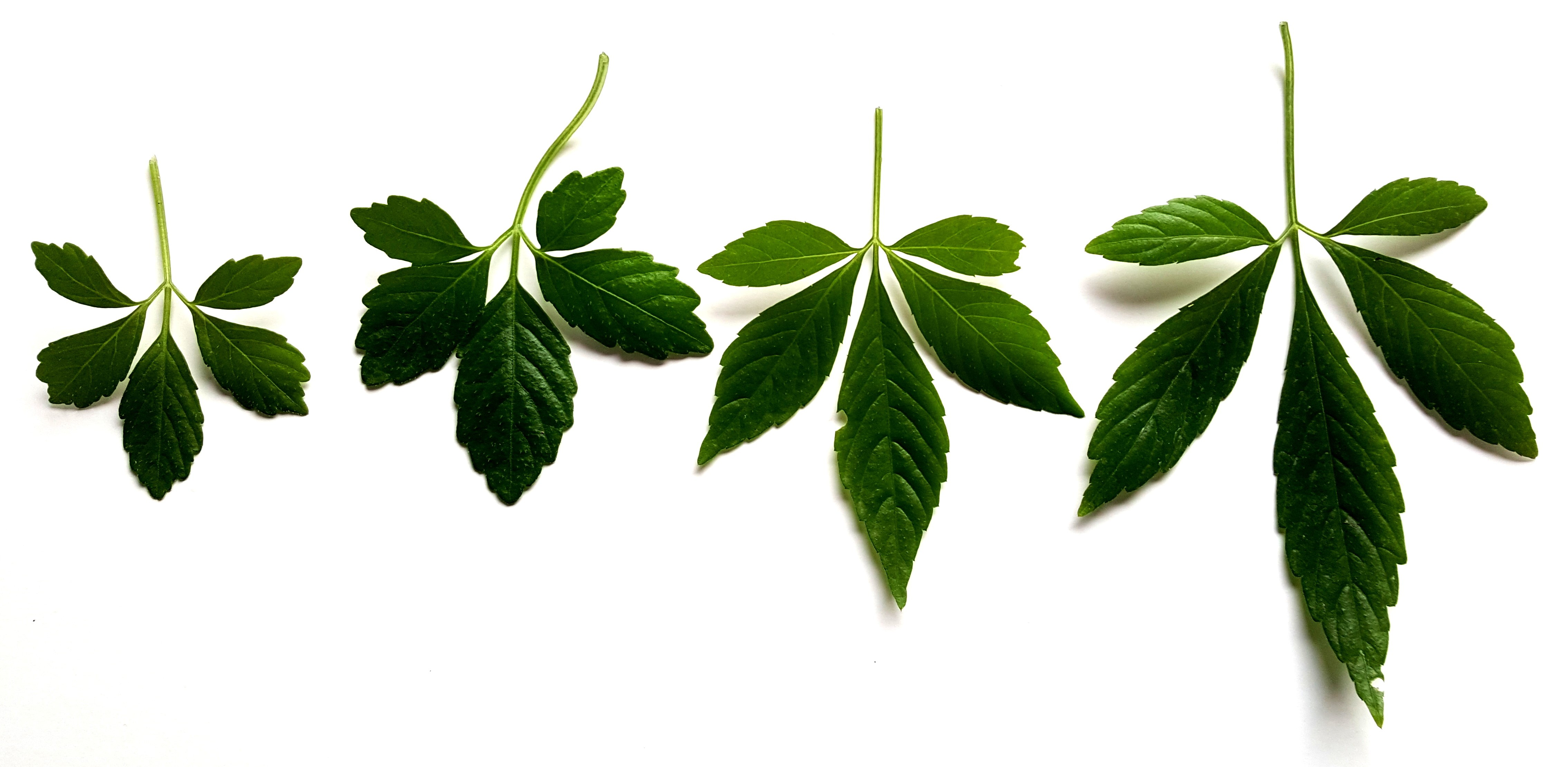 Jiaogulan-Blattentwicklung / Formen